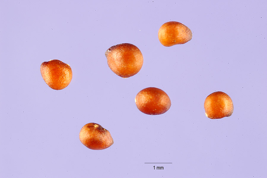 Comarum palustre L. - purple marshlocks